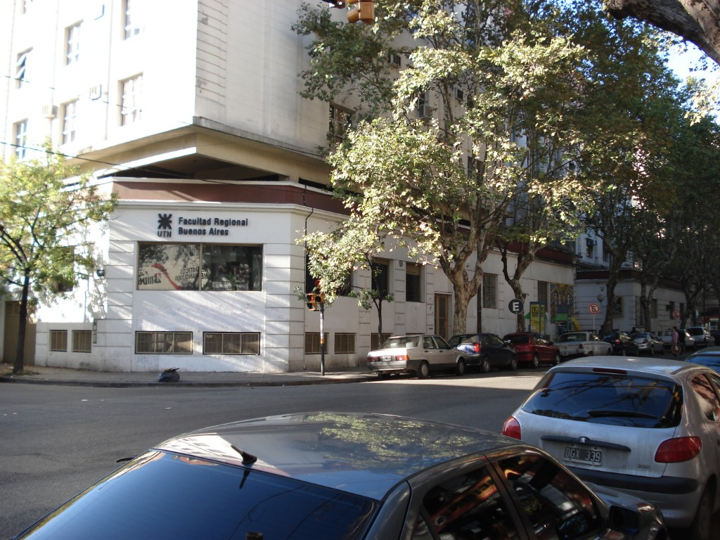 Universidad Tecnológica Nacional, facultad regional Buenoa Aires (Medrano 951). Ciudad Autonoma de Buenos Aires, Argentina.